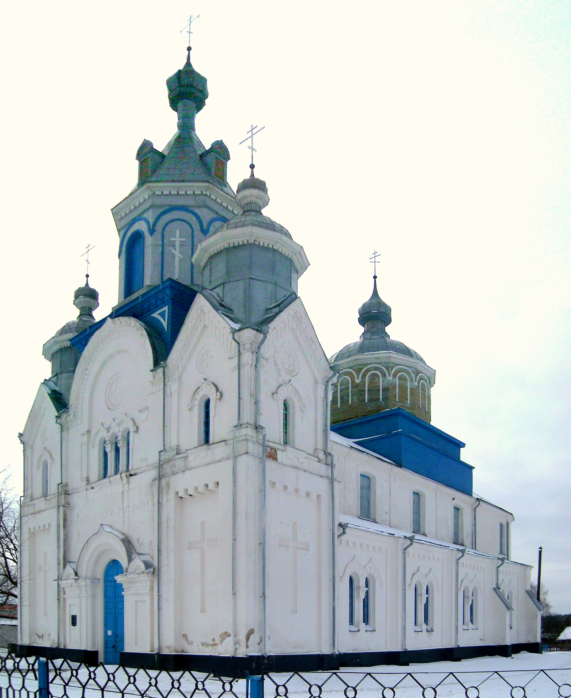 Беларуская (тарашкевіца): Пакроўская царква. Крывошын This is a photo of Belarusian heritage monument. Reference number: 112Г000476 ( WLM)